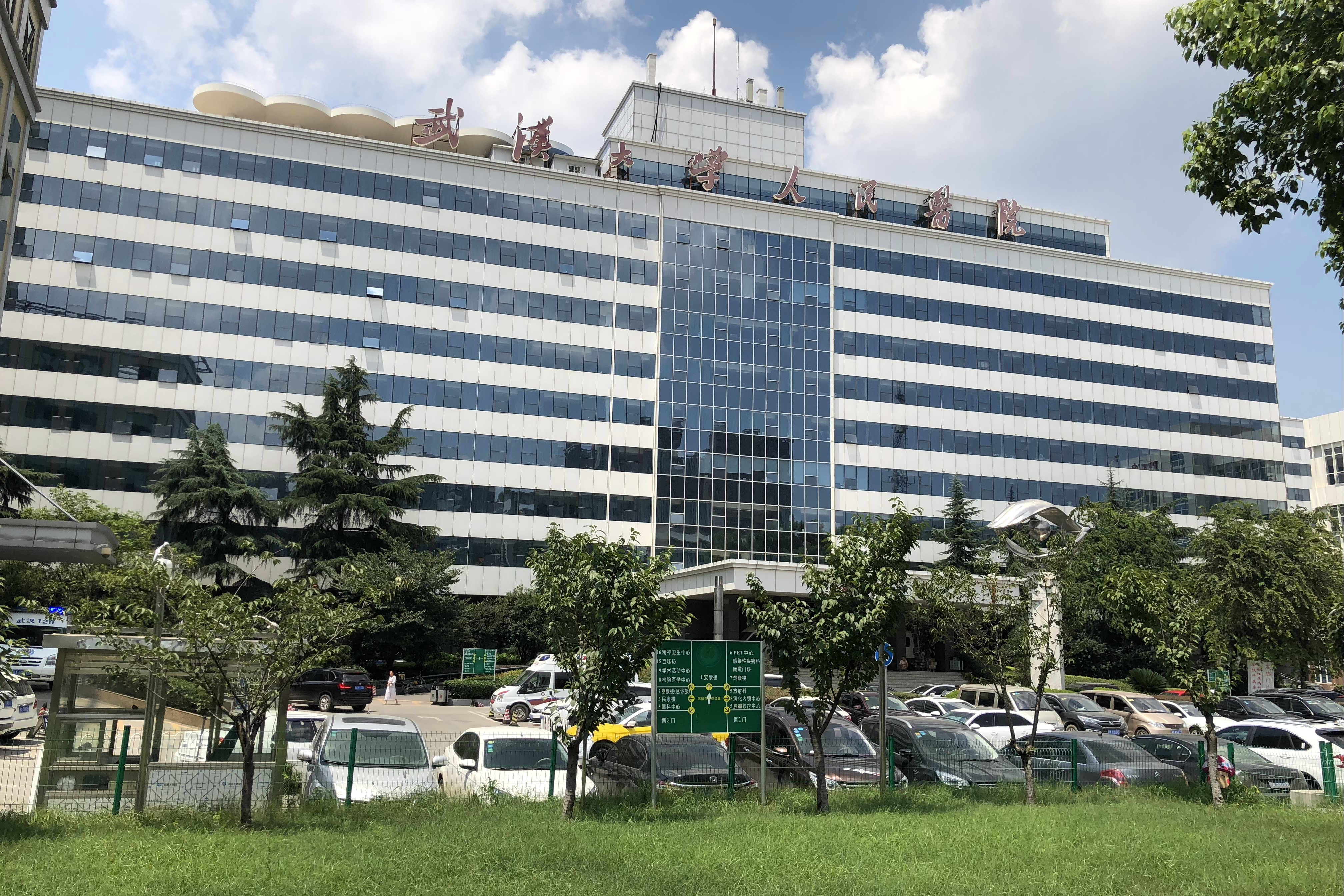 中文（中国大陆）: 湖北省人民医院 安康楼